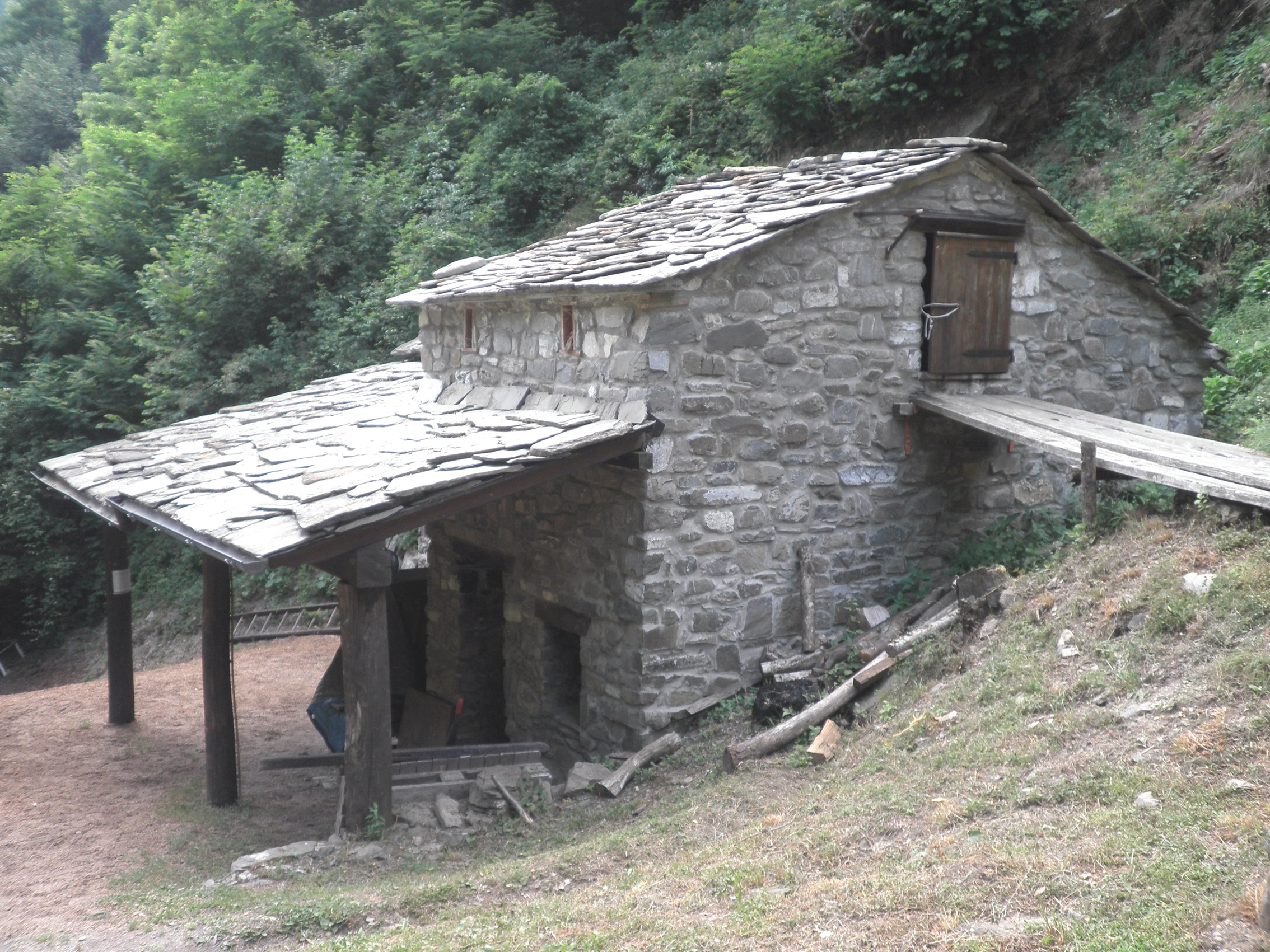 Un metato per l'essiccazione delle castagne (poi le castagne secche vengono trasformate in farina) in località Orsigna (Pistoia) - Italia